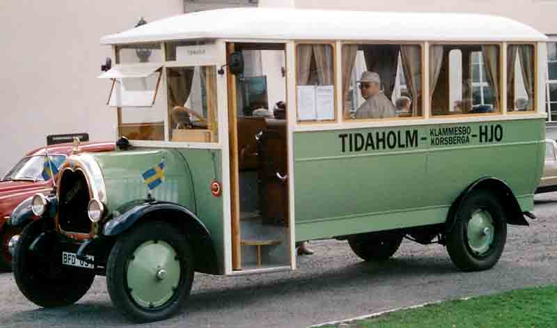 Tidaholm TSLO 19-passenger bus 1925.